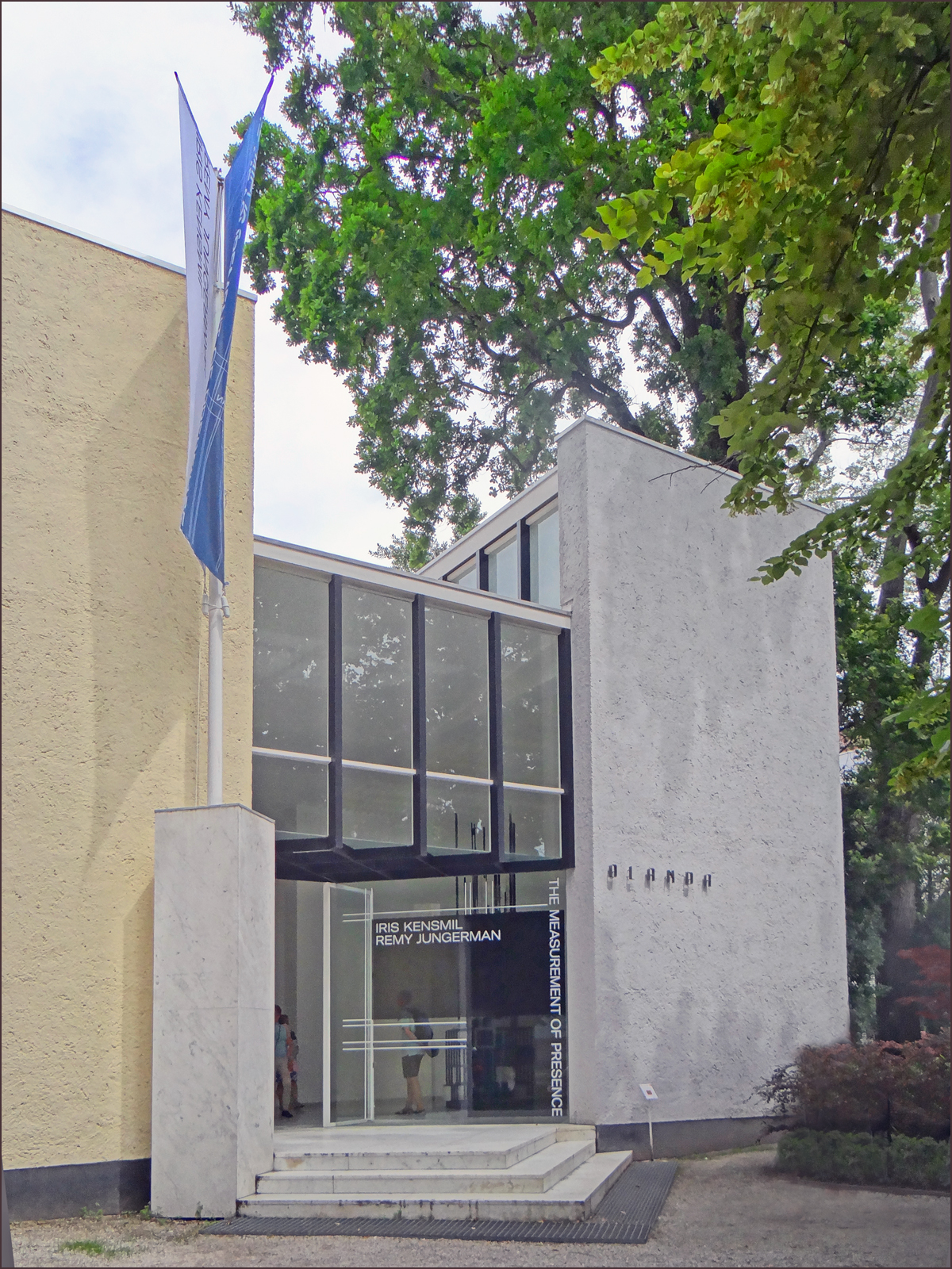 Façade du pavillon national des Pays-Bas dans les "Giardini" à Venise Le pavillon des Pays-Bas a été conçu puis construit entre 1953 et 1955, selon l'esthétique néoplastique, par le grand architecte Gerrit Thomas Rietveld. Il a été restauré en 1995, ce bâtiment constitue un des joyaux architecturaux des "Giardini" à Venise. Lors de la biennale d'art 2019, les deux artistes sélectionnés par les Pays-Bas : Iris Kensmil et Remy Jungerman ont rendu hommage dans leurs propres oeuvres au style néoplastique. Le pavillon national des Pays-Bas sur le site officiel de la Biennale d'art 2019